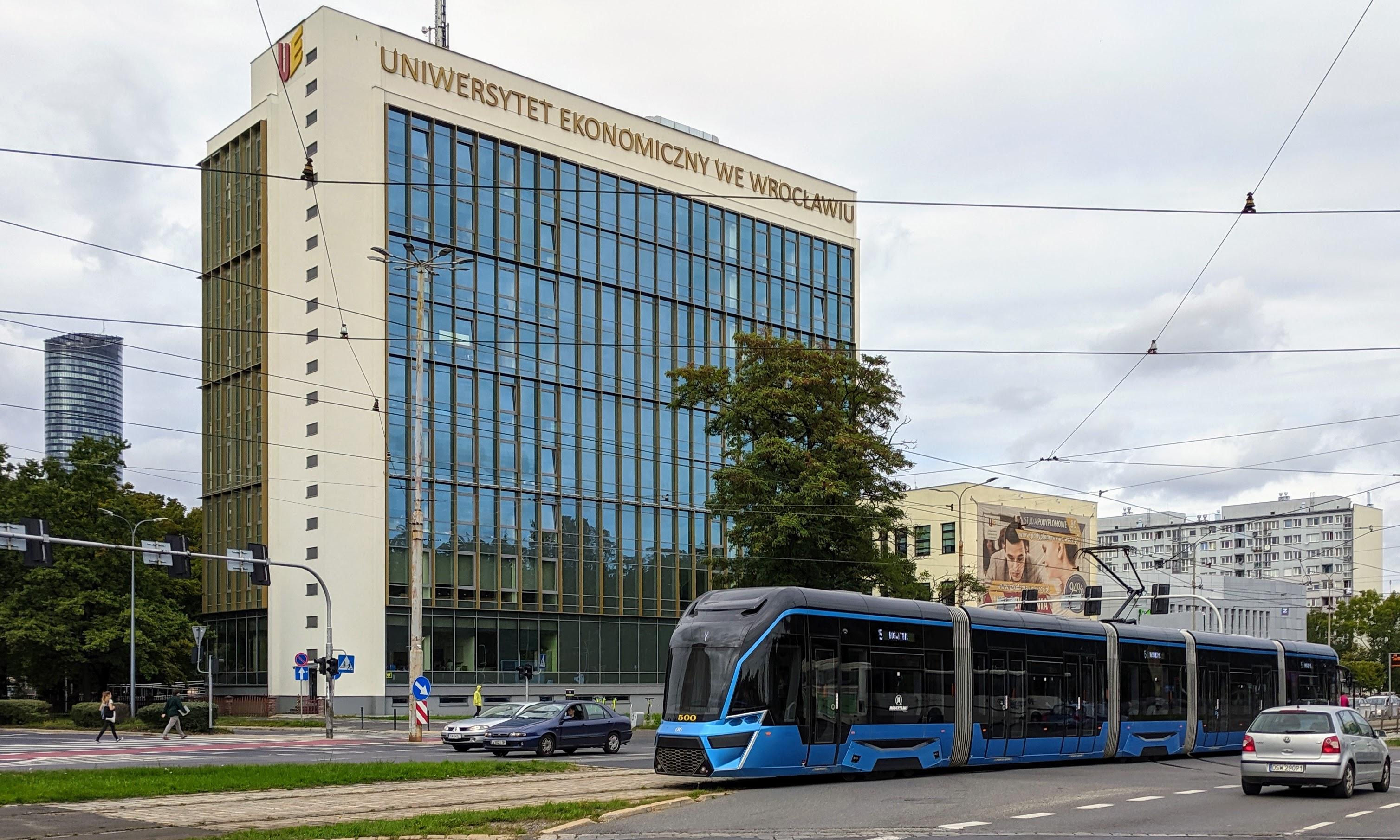 Tramwaj linii 15 nr 500, typ Moderus Gamma, po odjeździe z przystanku przy ul. Ślężnej we Wrocławiu w kierunku Poświętnego. Na drugim planie budynek Uniwersyetu Ekonomicznego we Wrocławiu (Wydział Zarządzania, Informatyki i Finansów), w głębi wieża Sky Tower